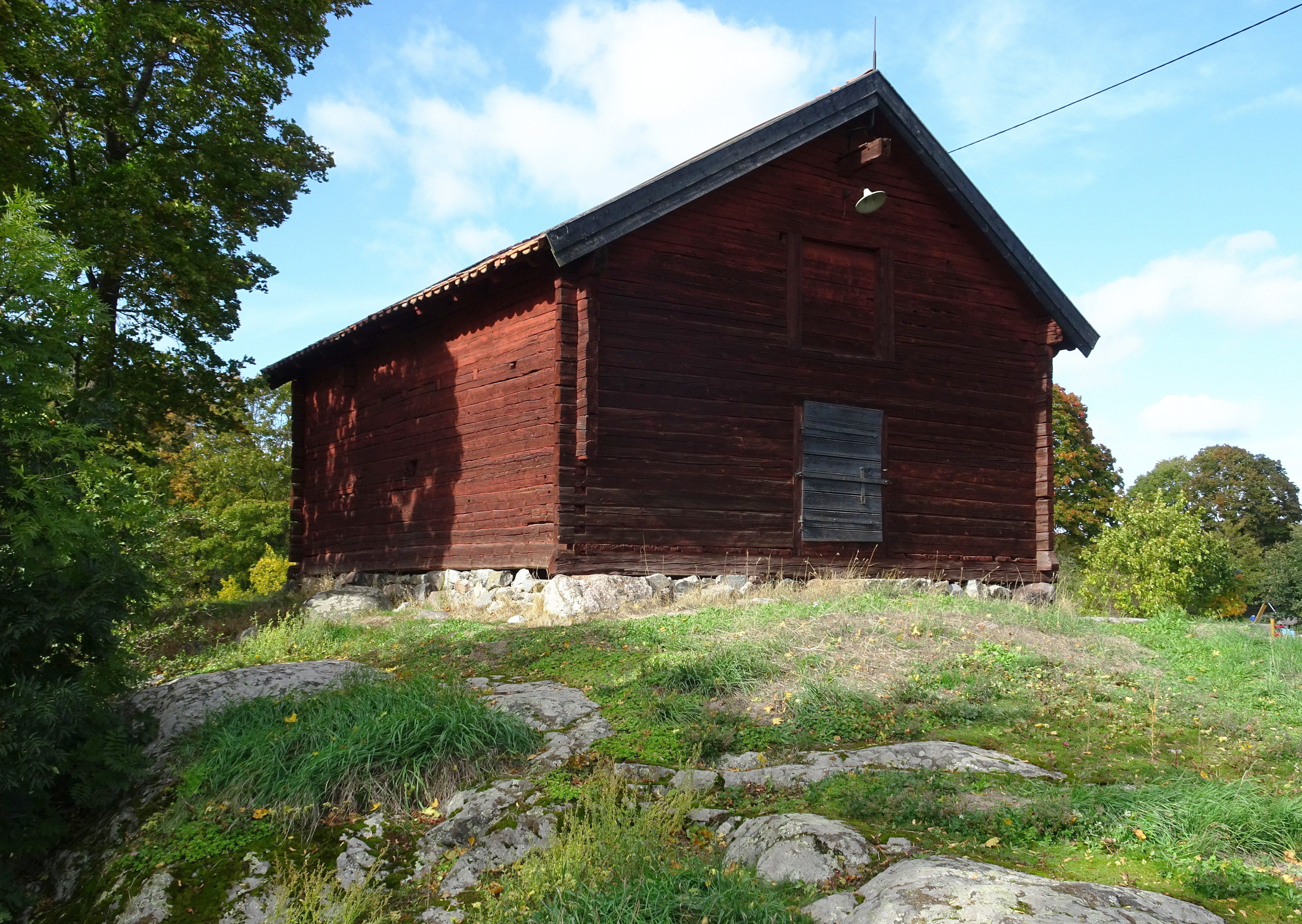 Stora Ängby, magasin